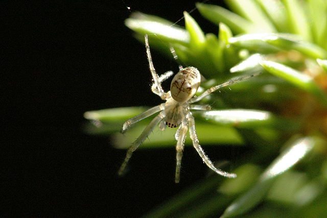 male Metellina segmentata from Commanster, Belgian High Ardennes .